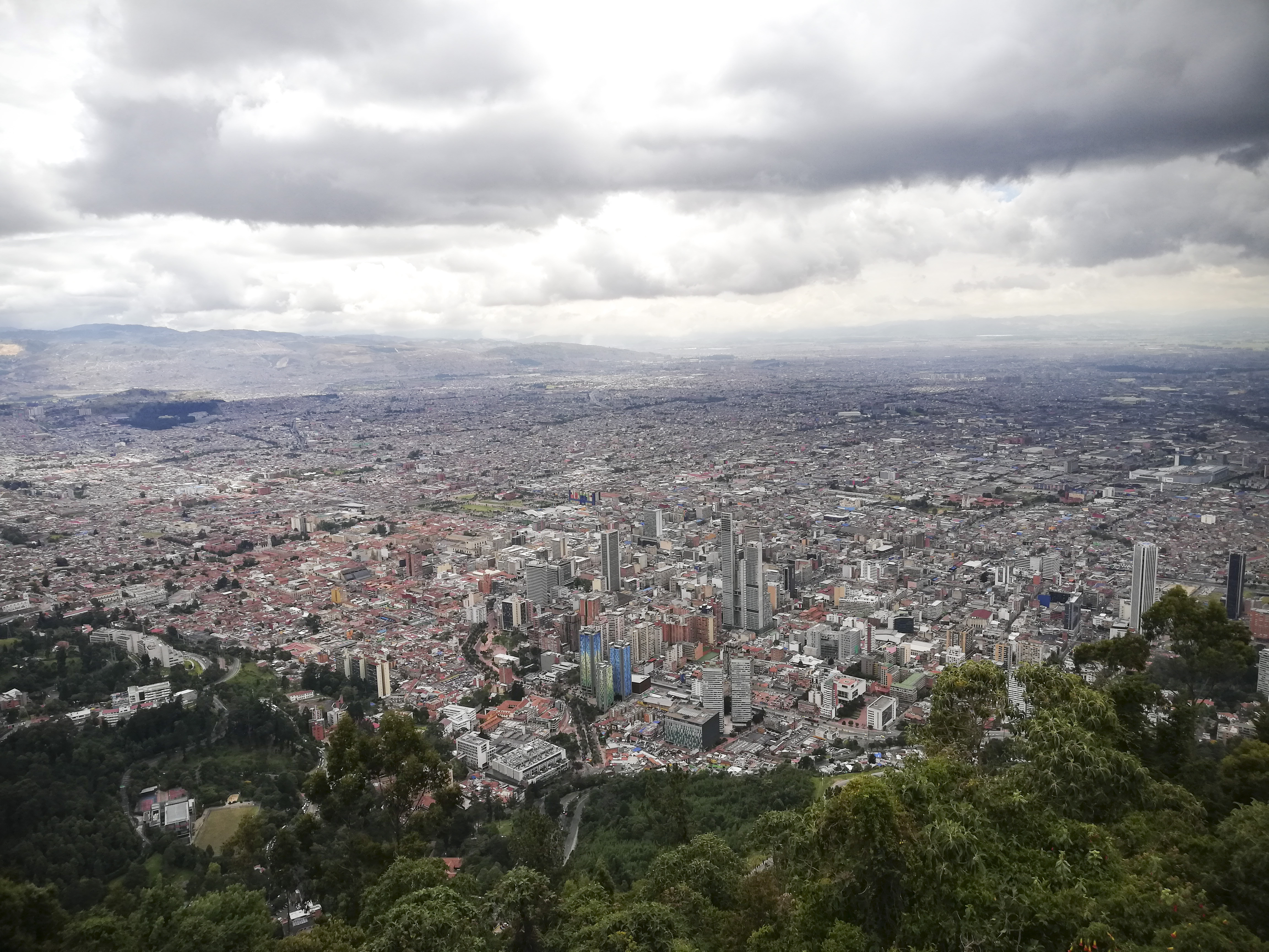 Blick auf Bogota